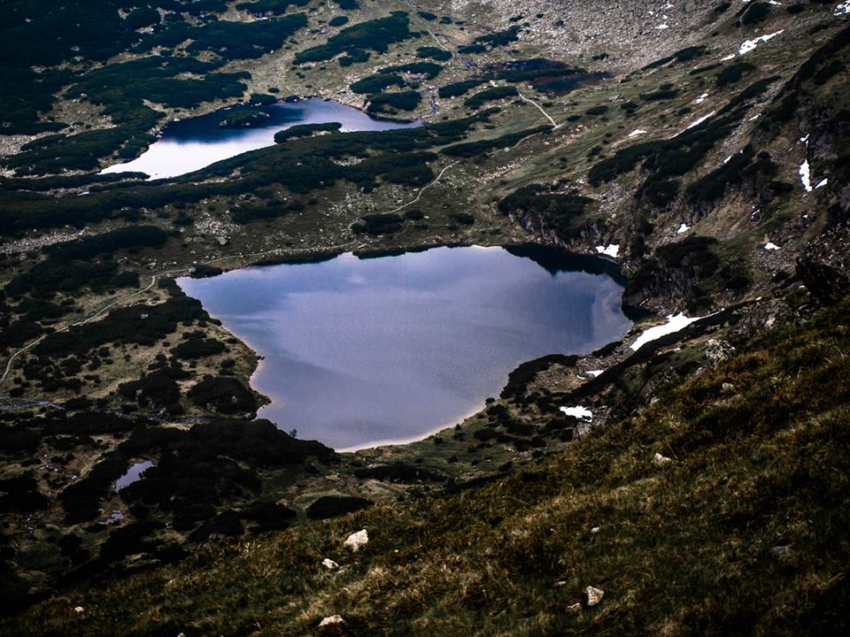 Zielony staw, widok z Kasprowego Wierchu, w tle Kurtkowiec.